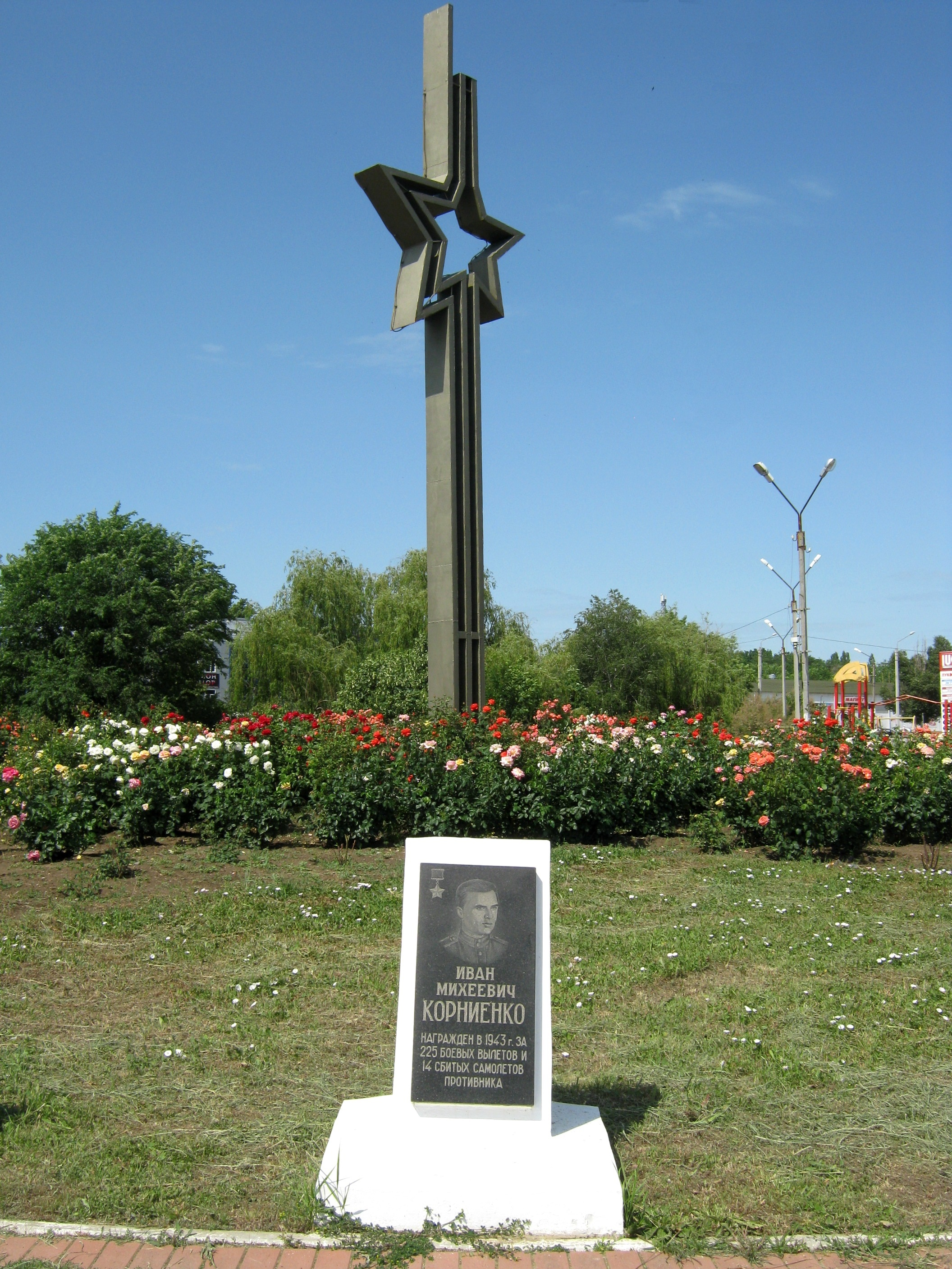 Каменск - Корниенко 1